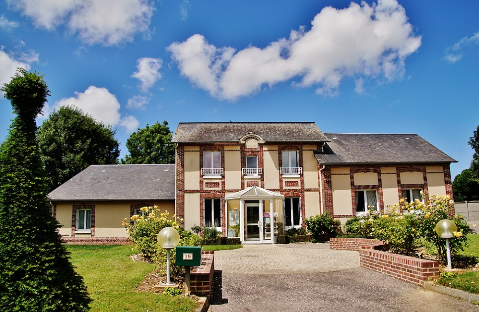 La Mairie